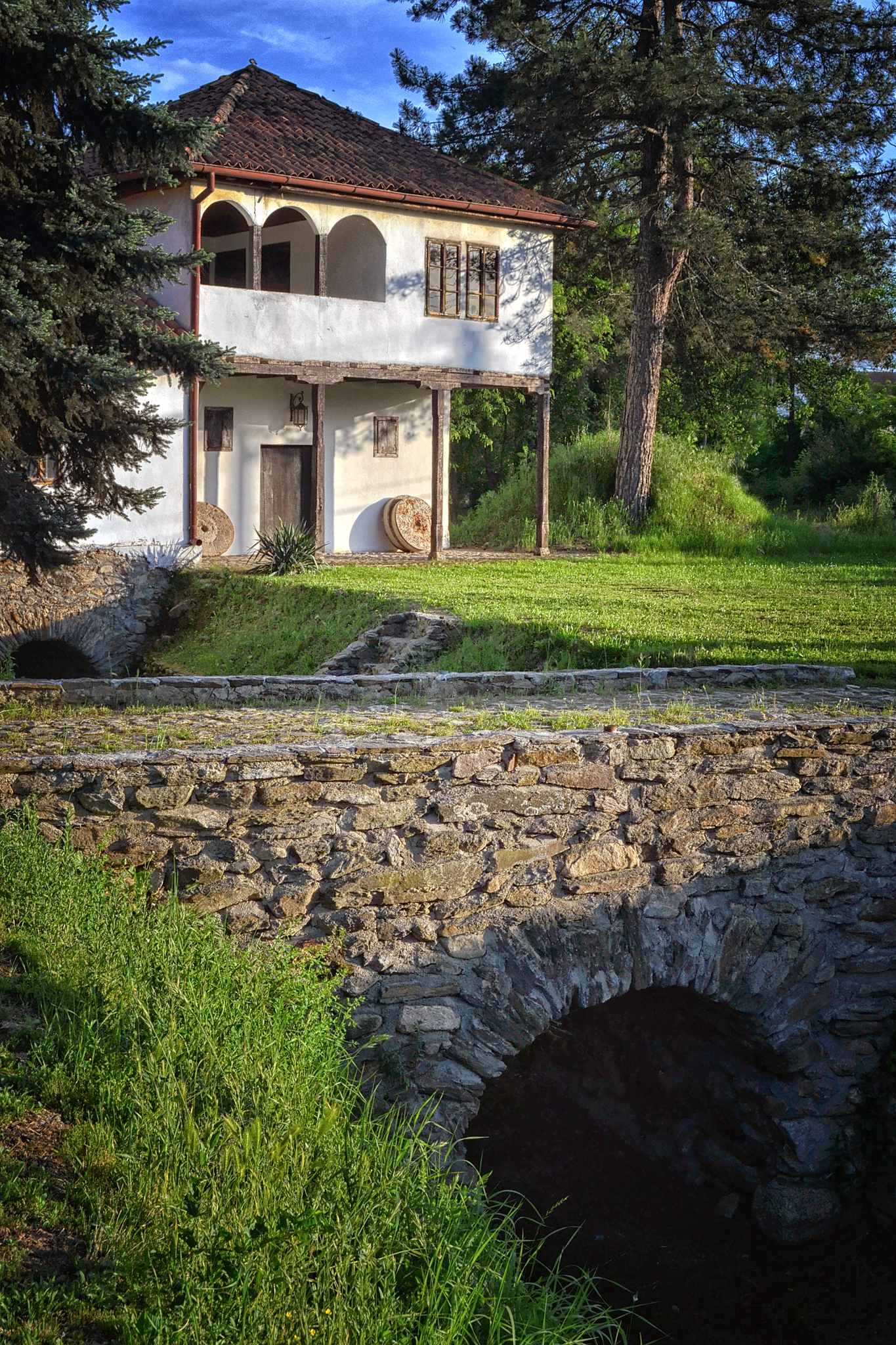 Srpski (latinica): Muzej tekstilne industrije u selu Strojkovce. Tacnije fabrika pletenih kablova iz 19og veka.